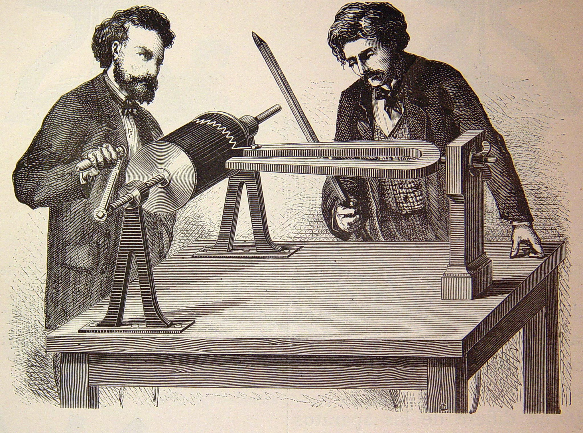 "Estudio gráfico y anotación de ondas sonoras".